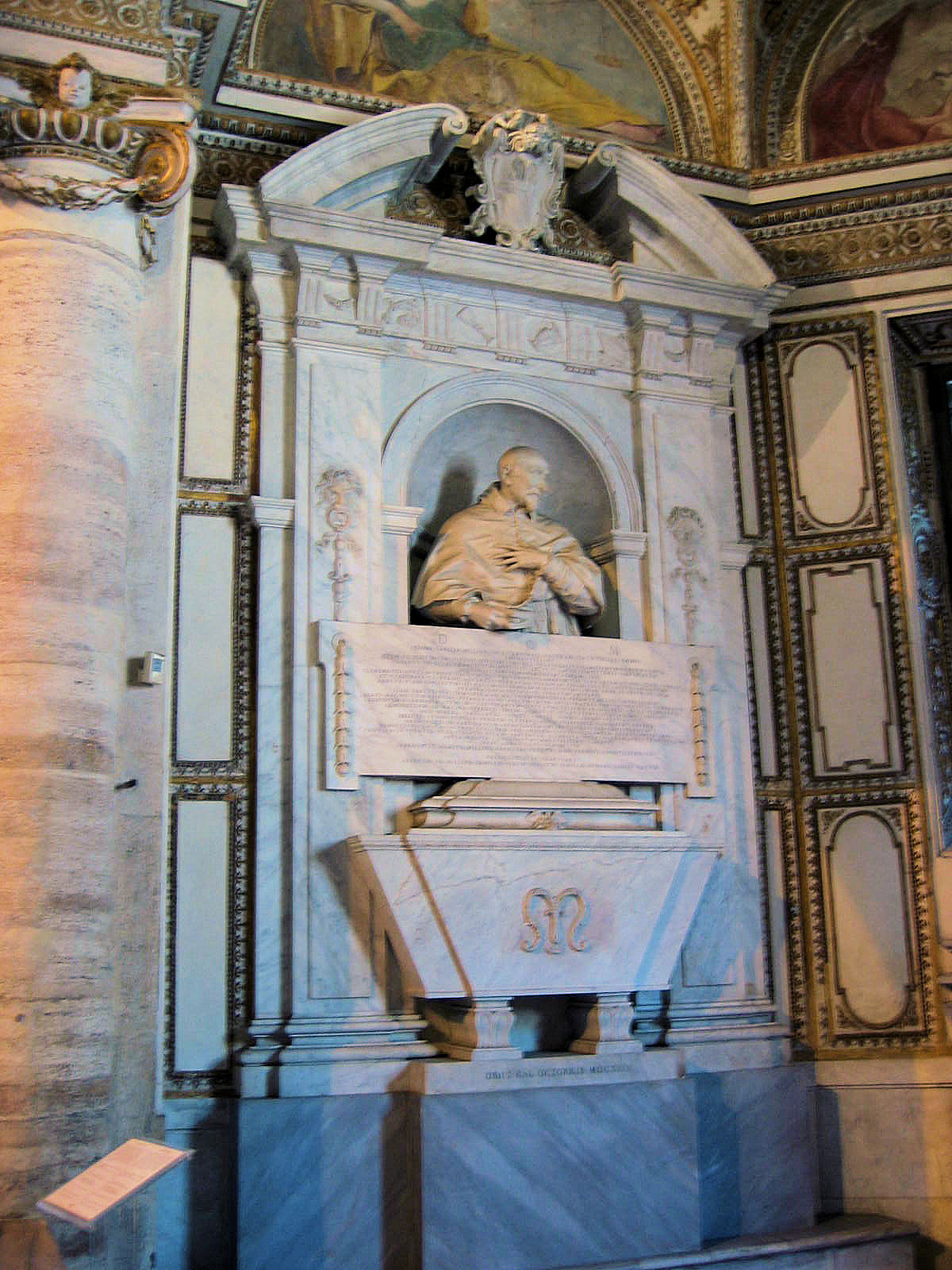 Alessandro Algardi - Monument to Cardinal Giovanni Garzia Mellini (1637-1638). Santa Maria del Popolo, Roma. Picture by Torvindus.